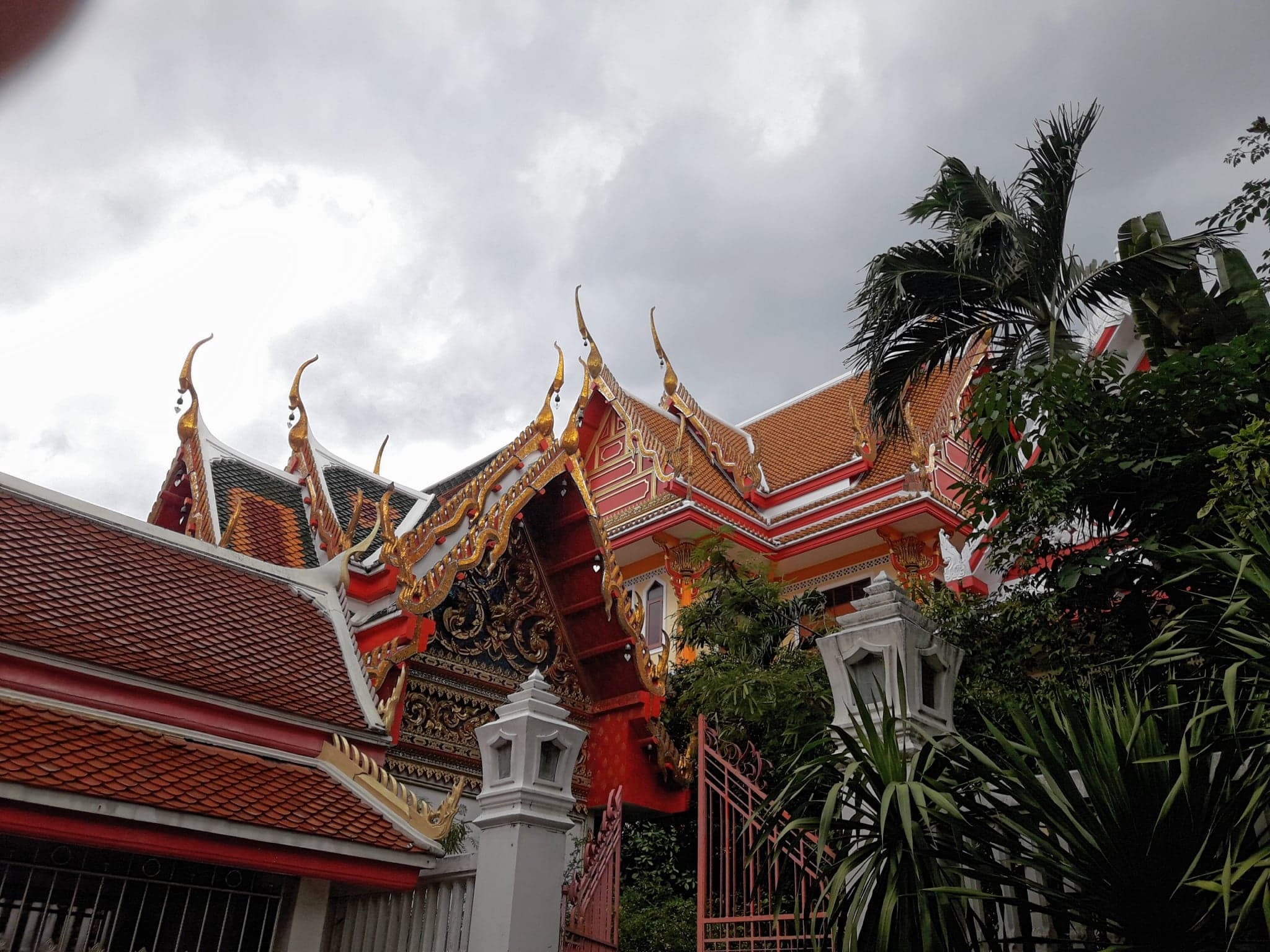 วัดชัยชนะสงคราม Wat Chaichanasogkram 2